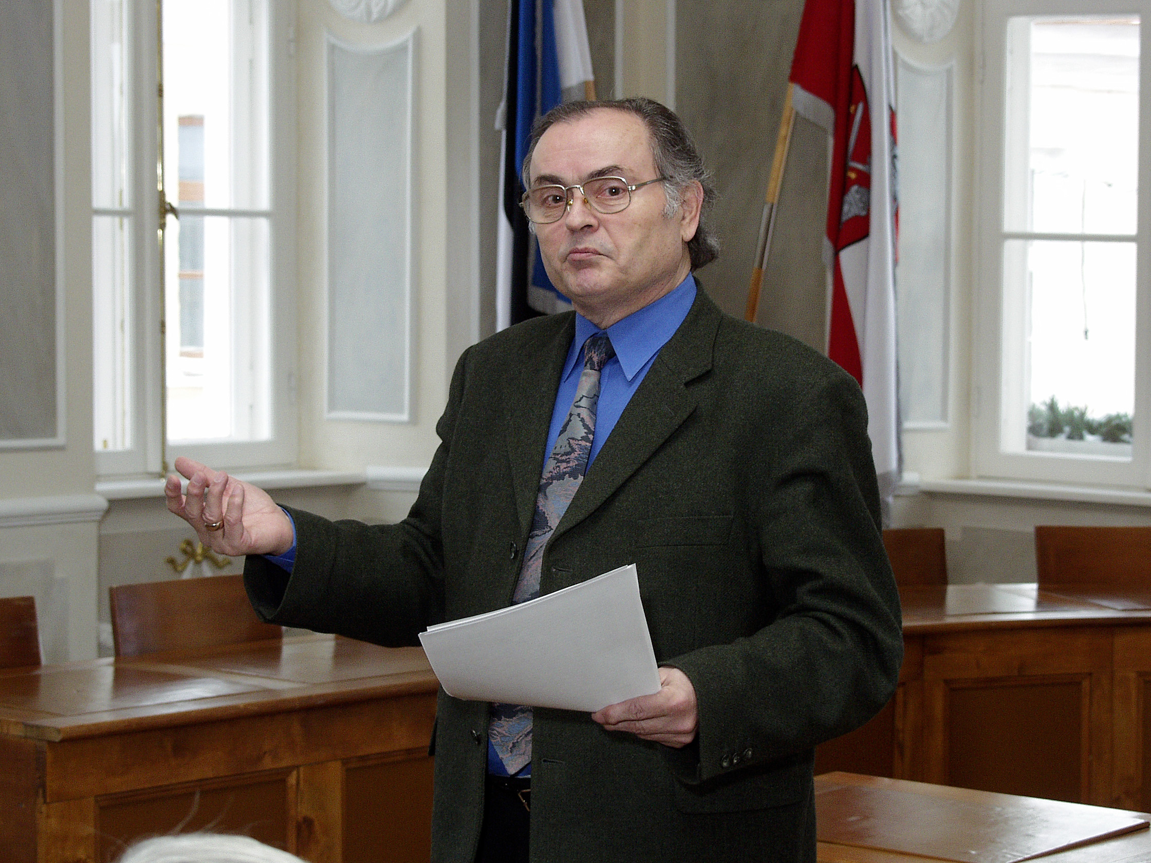 Professor Aleksandr Dulitšenko 4. veebruaril 2005 Tartu Raekojas teaduskonverentsil "Interlingvistika ja eurolingvistika", mis toimus keeleteadlase Paul Ariste 100. sünniaastapäeva ürituste raames.